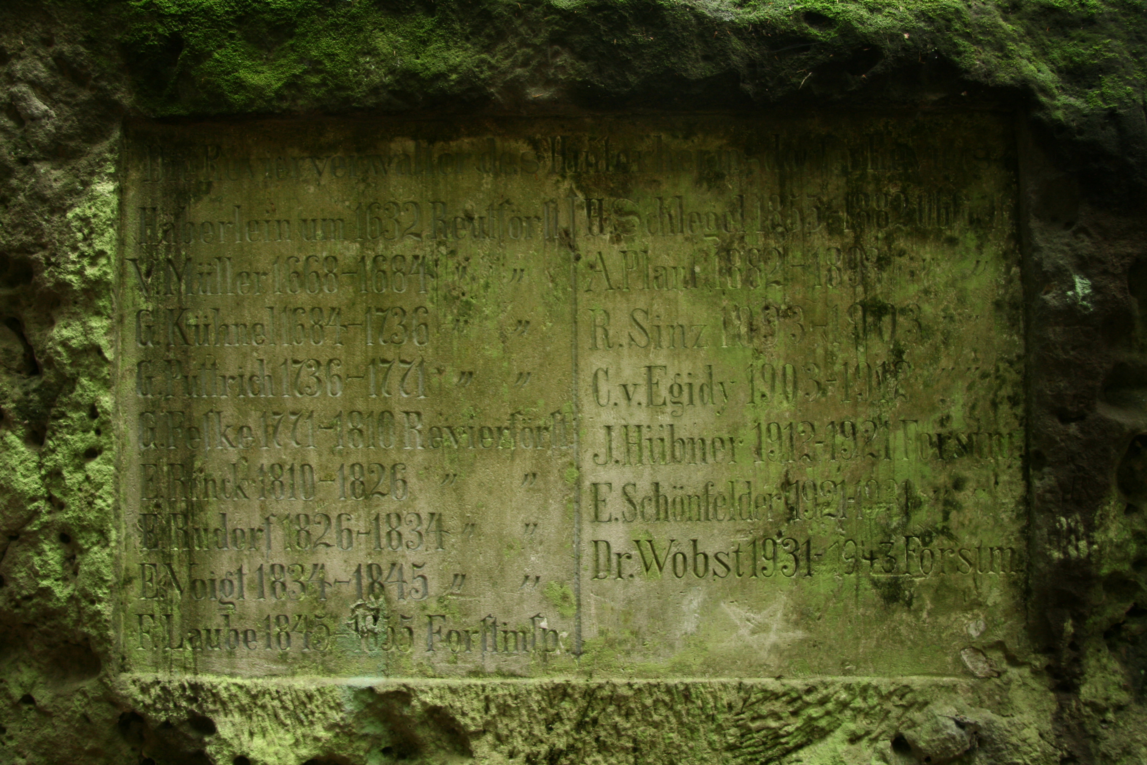 Inschrift des Altarsteins im Kirnitzschtal, Elbsandsteingebirge